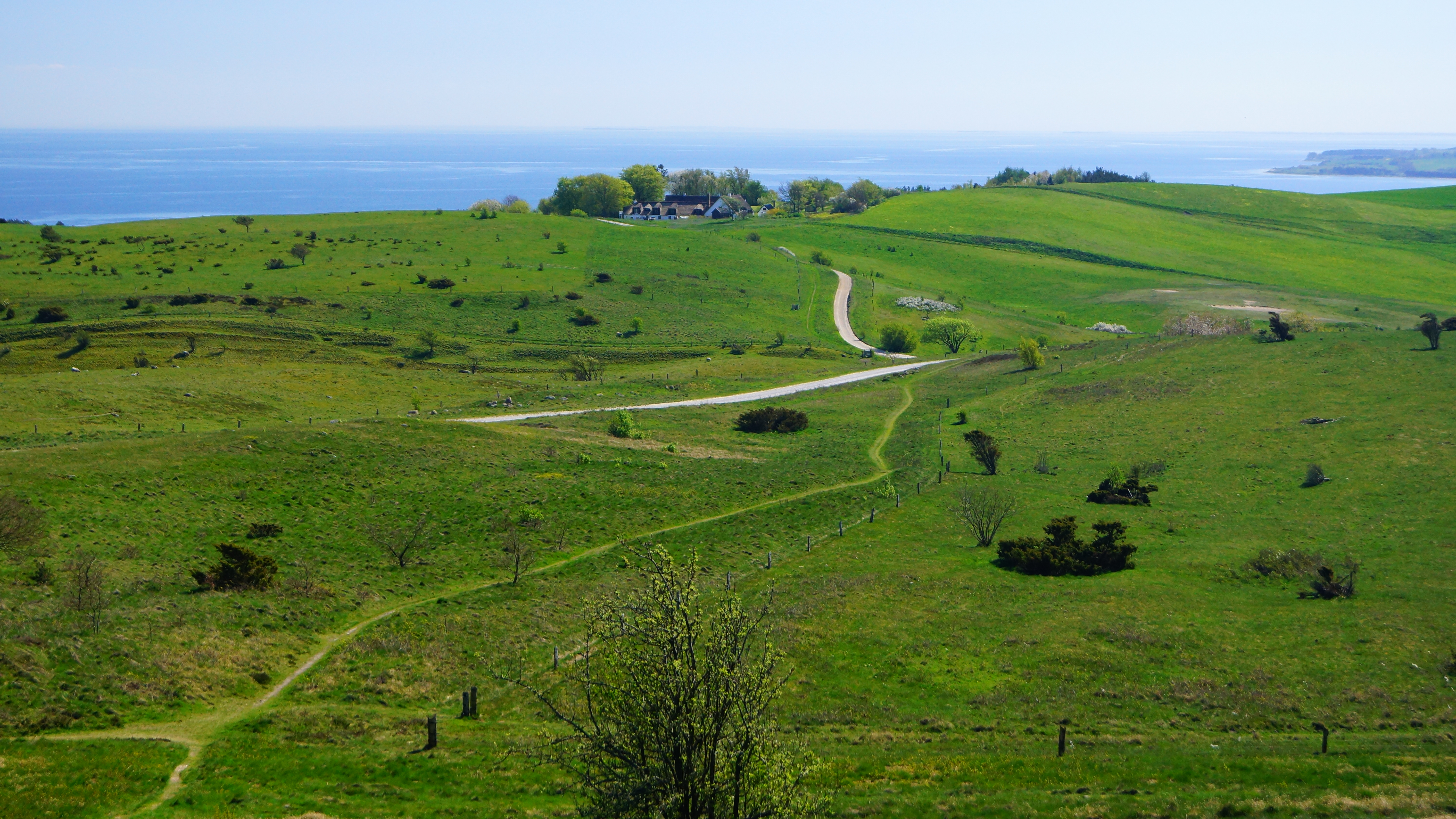 Trehøje, udsigt mod sydøst